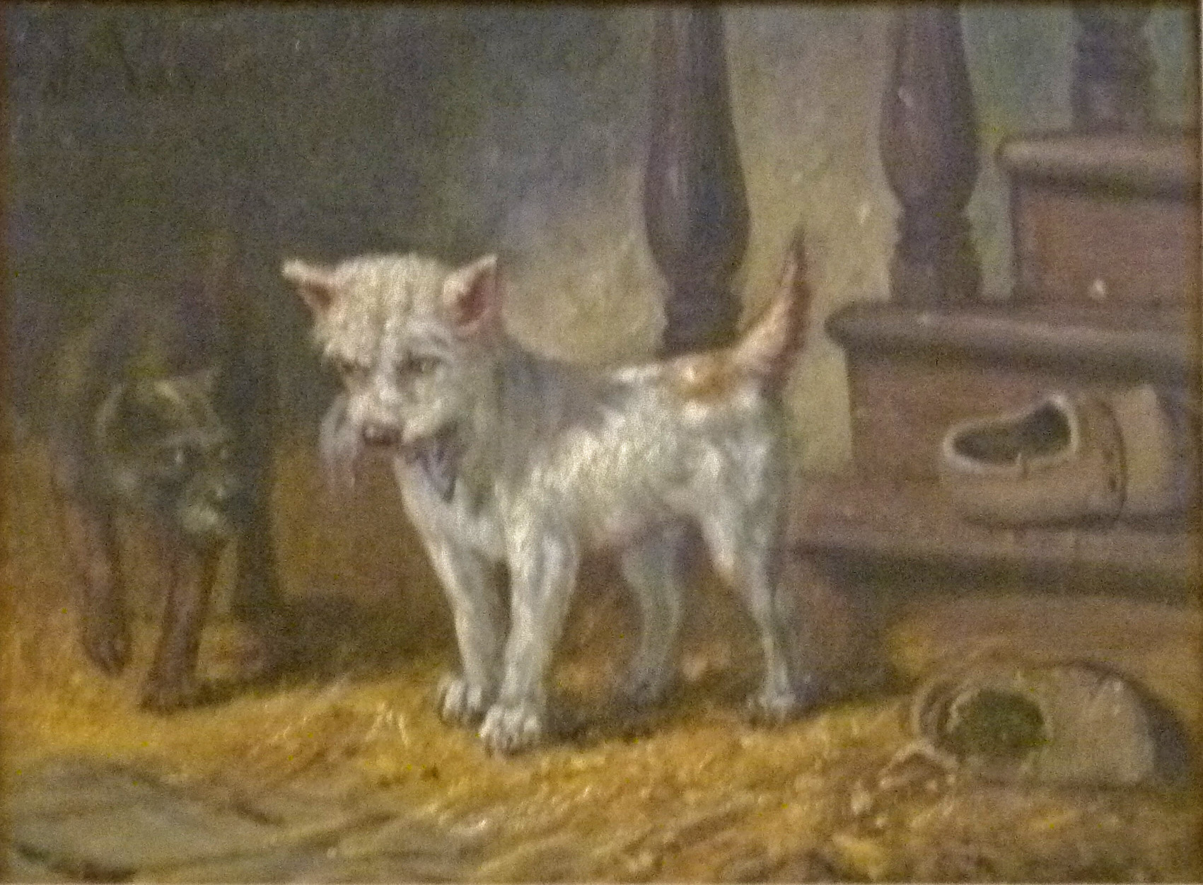 "Twee hondjes", olieverf op paneel (18 x 24 cm) door de Belgische kunstschilder Joost-Vincent De Vos (1829-1875); privébezit